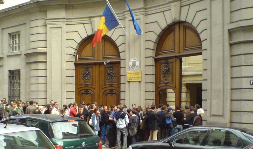 Devant l'ambassade roumaine à Paris le jour du référendum de 2007, peu de temps avant la fermeture des bureaux de vote. Fin de la queue.